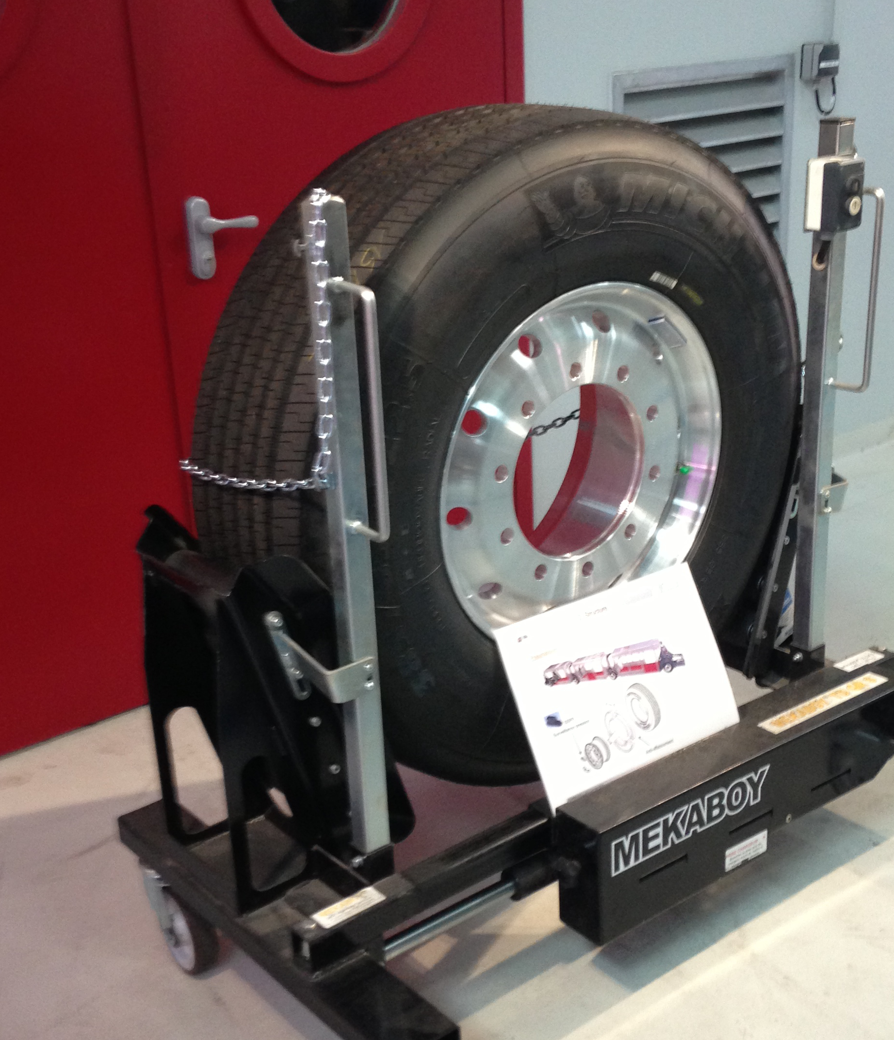 Roue d'un tramway Translohr STE3 au centre de remisage de Pierrefitte exposé le jour de l'inauguration officielle de la ligne 5 du tramway.